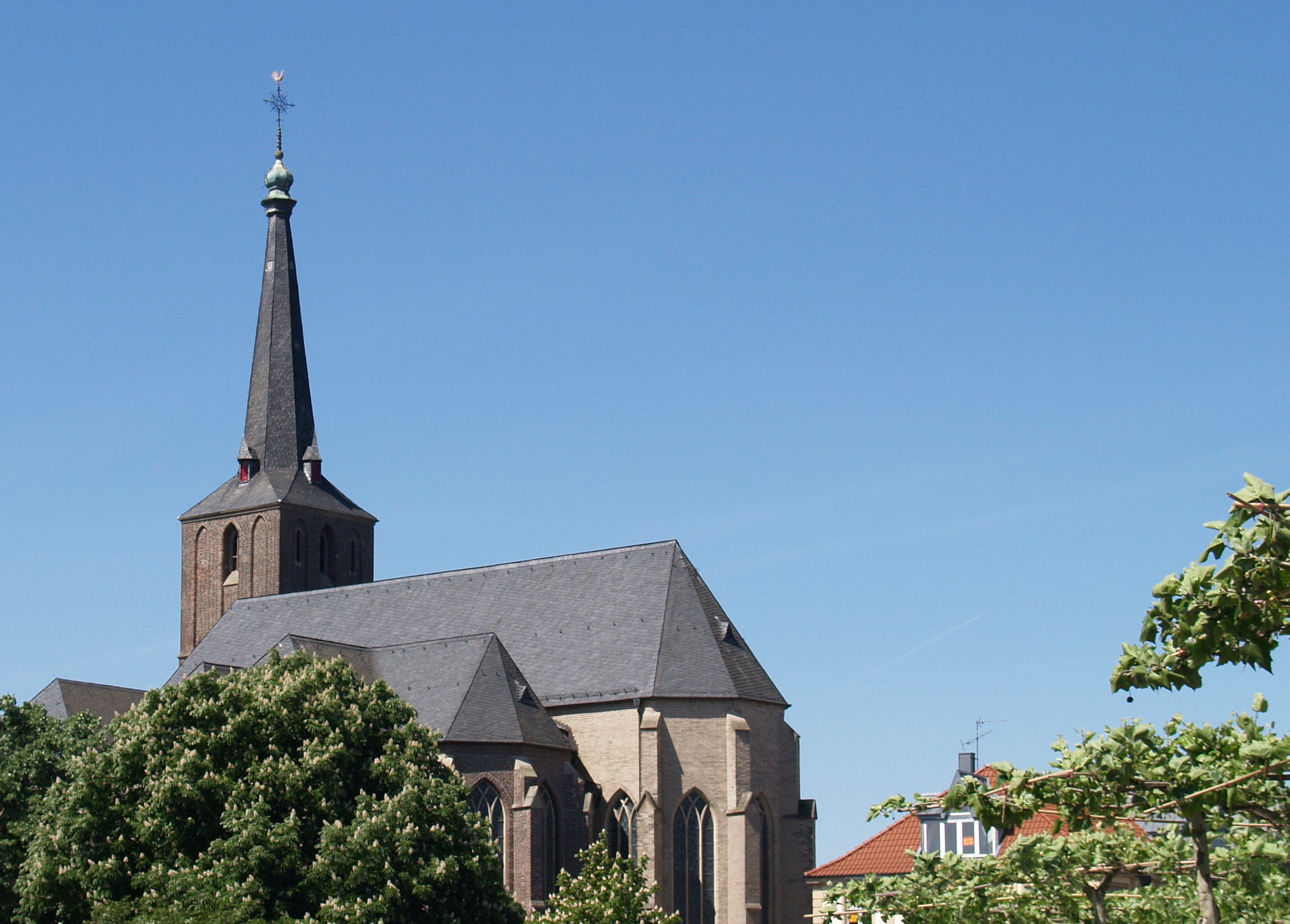 Church in Geldern